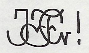 Zirkel der Münchner Landsmannschaft Helvetia (Paukregister)